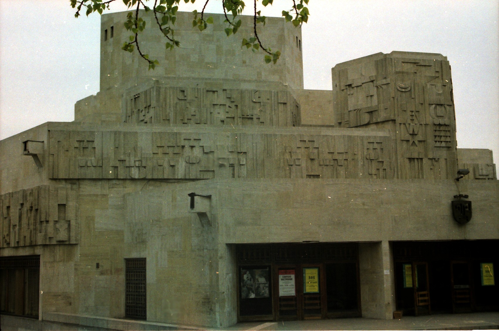 Fassade des Theater Sofia in Sofia Bulgarien; Reliefs gestaltet von Emilia N. Bayer; erbaut 1974